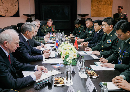 Встреча министра обороны России генерала армии Сергея Шойгу с министром обороны Китайской Народной Республики генерал-полковником Чаном Ваньцюанем